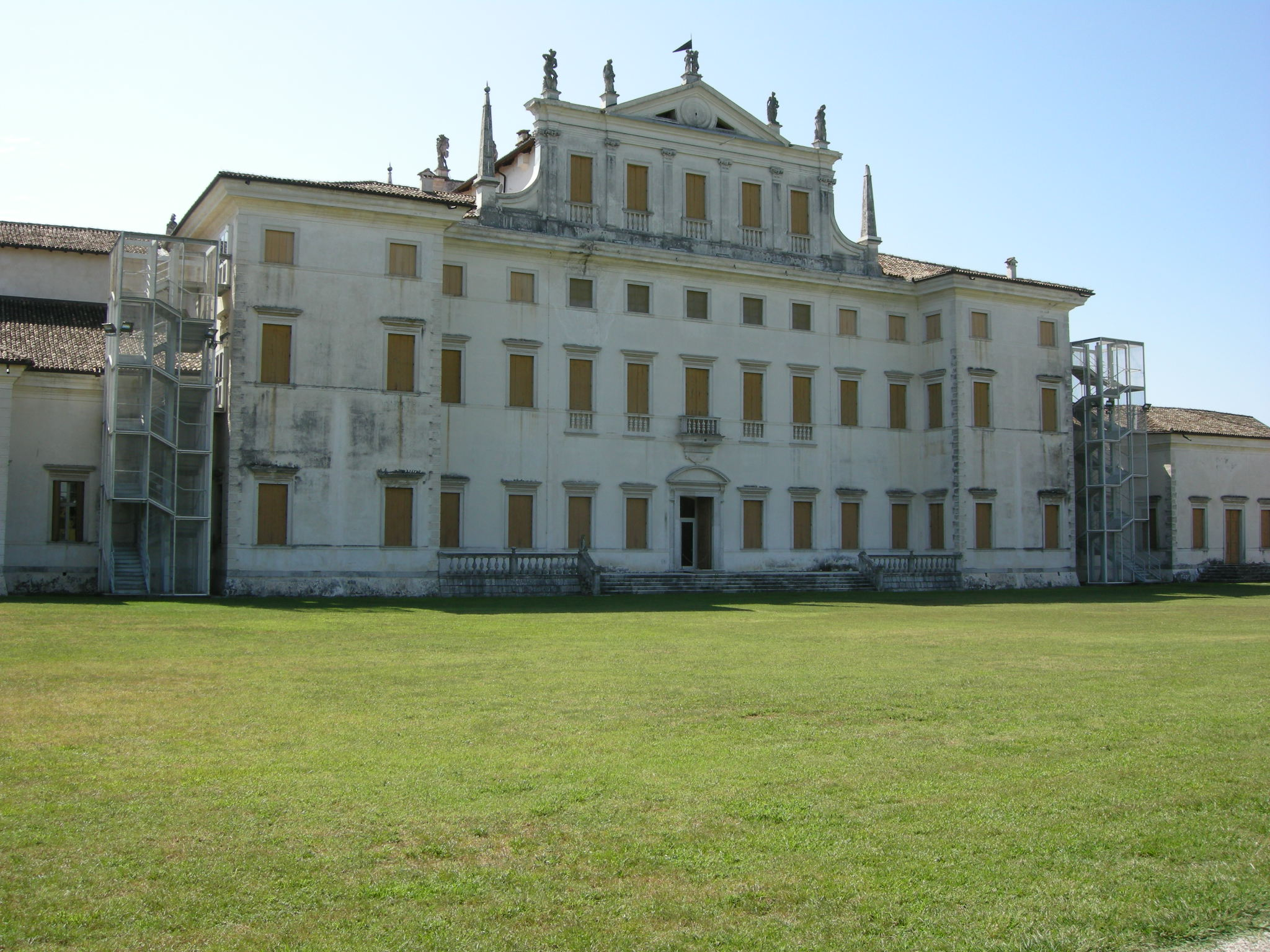 Villa manin, parco, retro villa